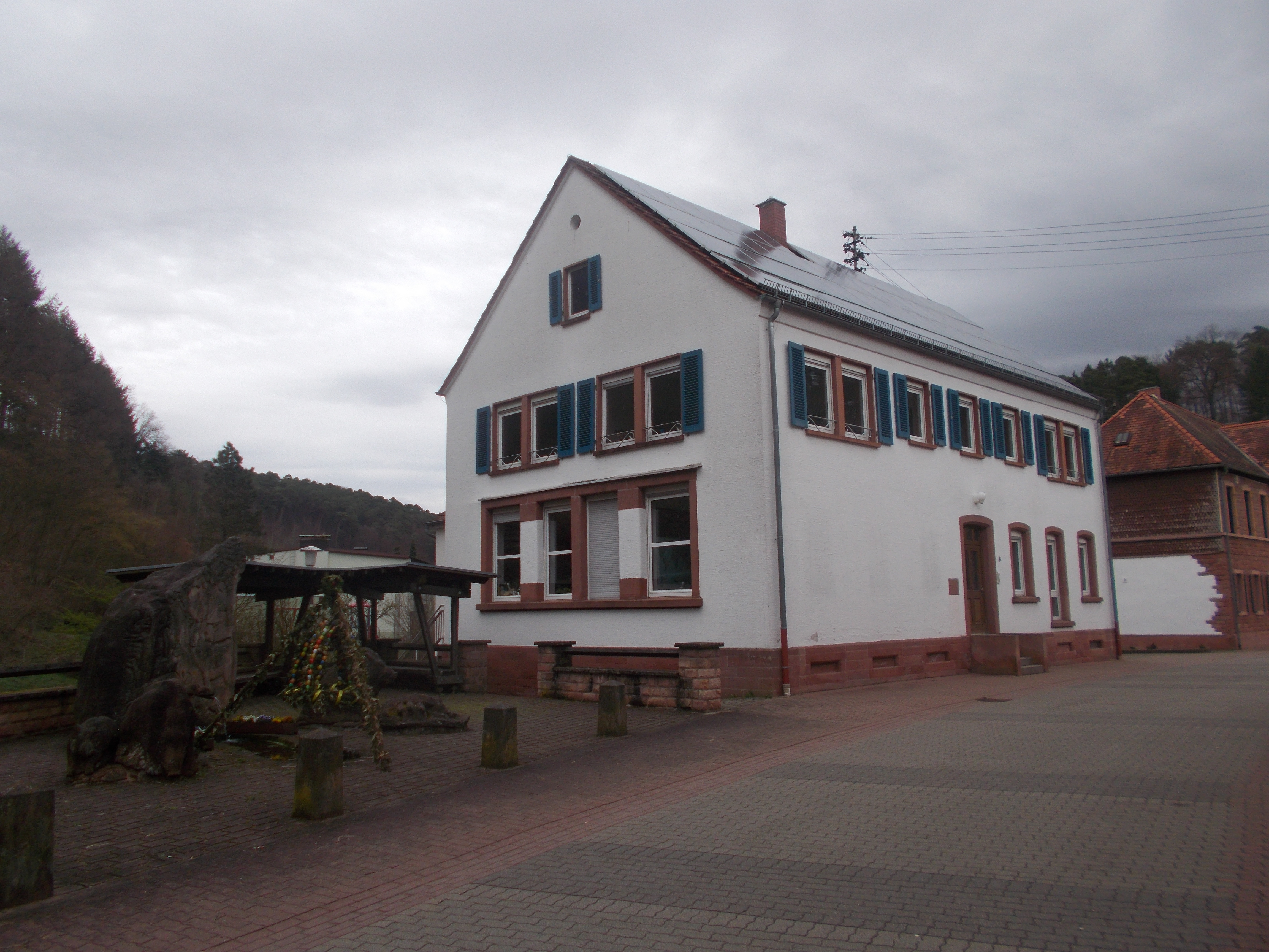 großer klassizistischer Walmdachbau, Scheune, Anfang des 19. Jahrhunderts; späterer Sandsteinquaderbau mit Pyramidendach